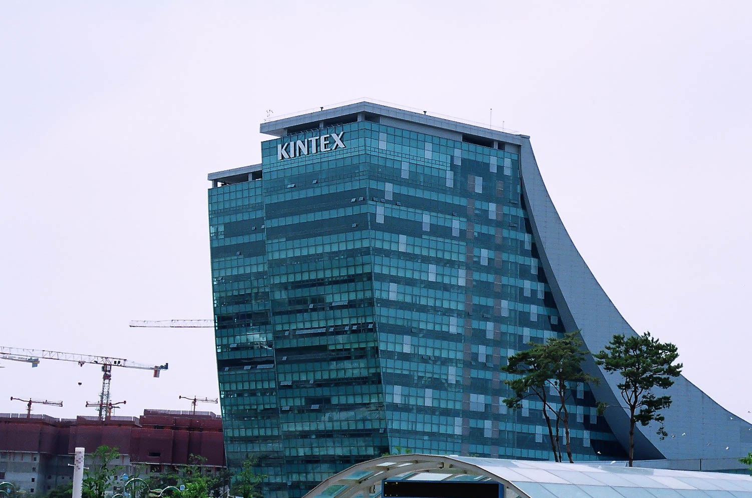 킨텍스의 건물 모습